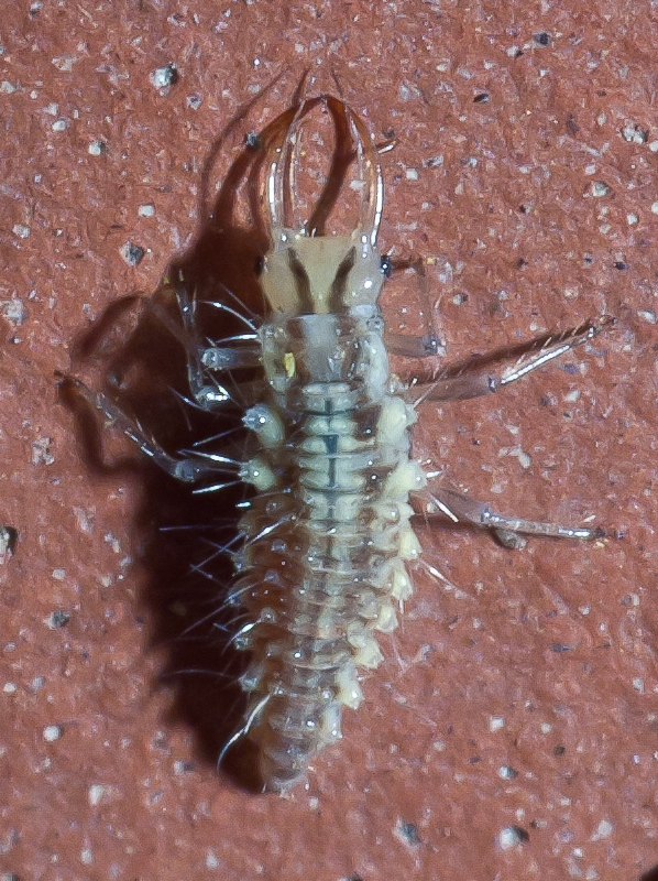 Larva en terceiro estado de Chrysoperla carnea, Brión, Galicia (Spain)